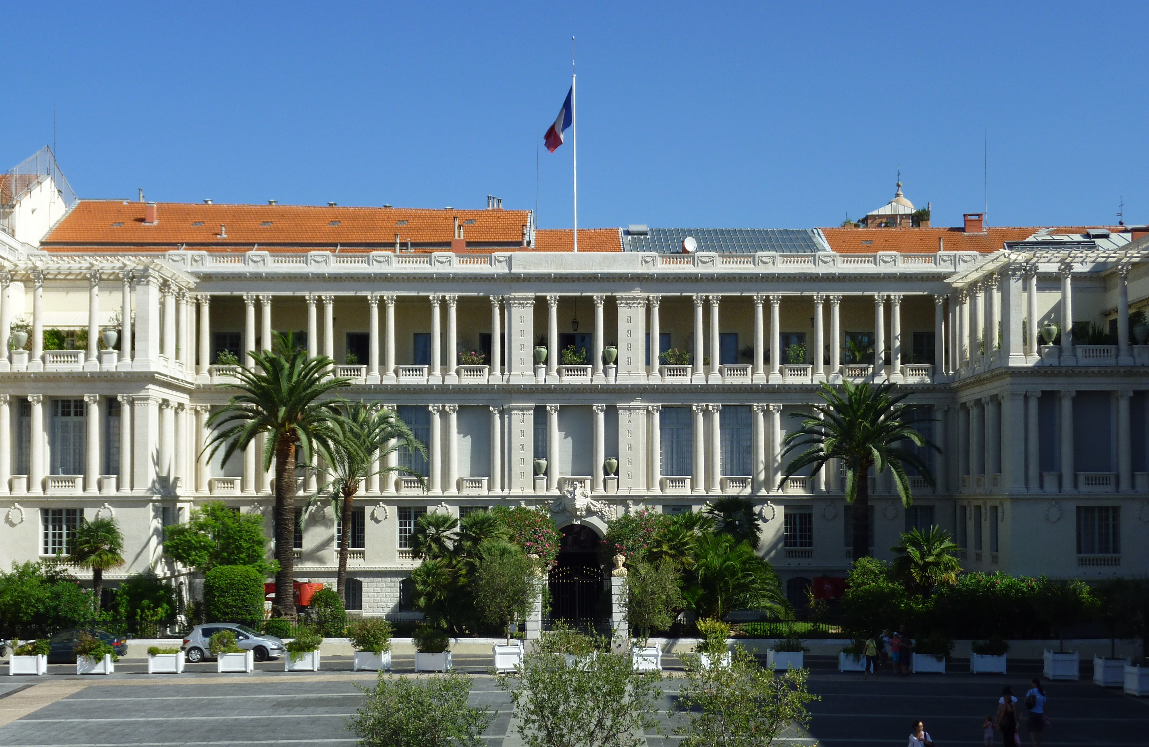 Palais des rois de Sardaigne, actuel Palais de la Préfecture, (Nice, Alpes-Maritimes, France) This building is en partie classé, en partie inscrit au titre des Monuments Historiques. .